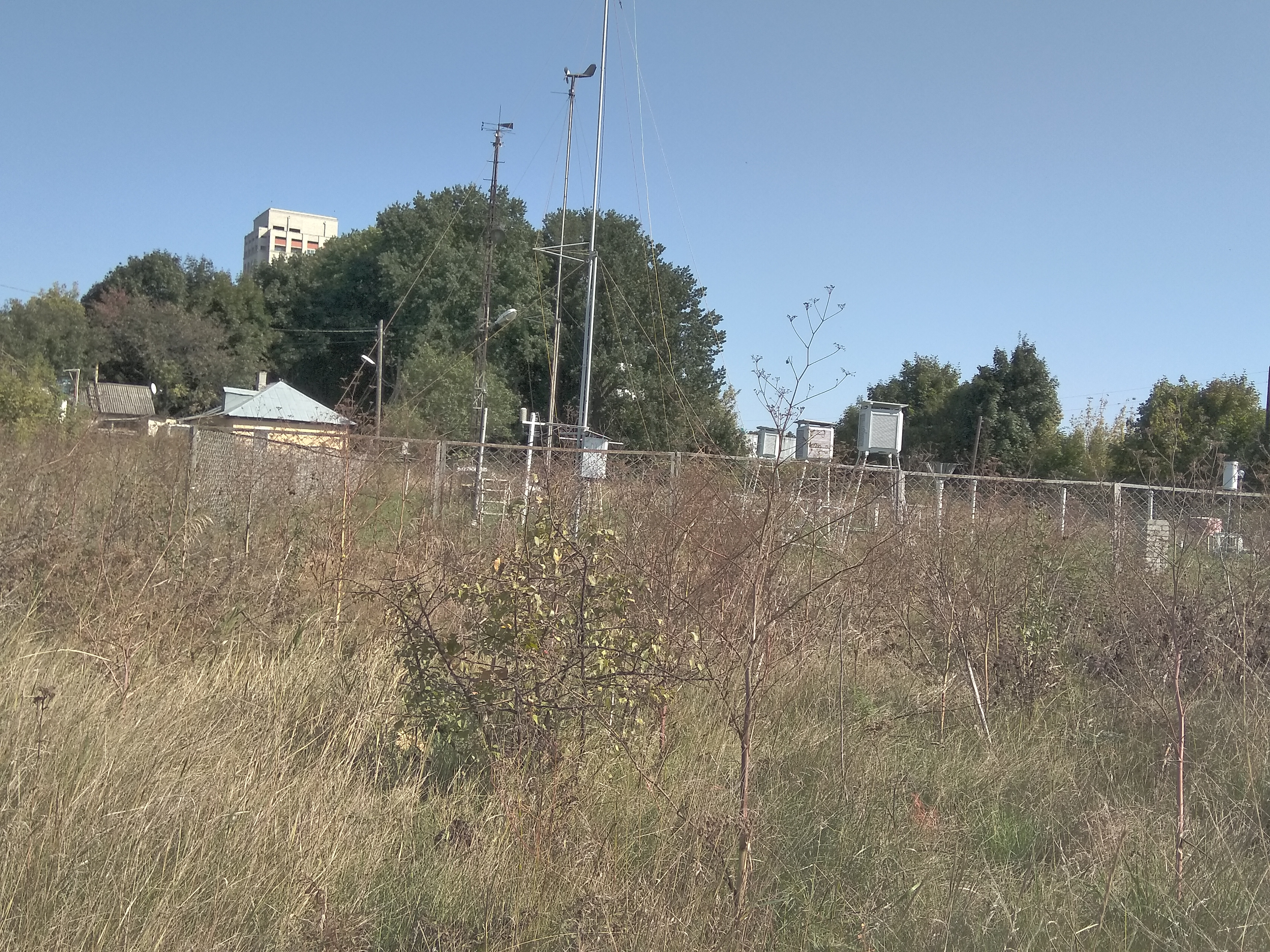 Метеостанция в Воронеже